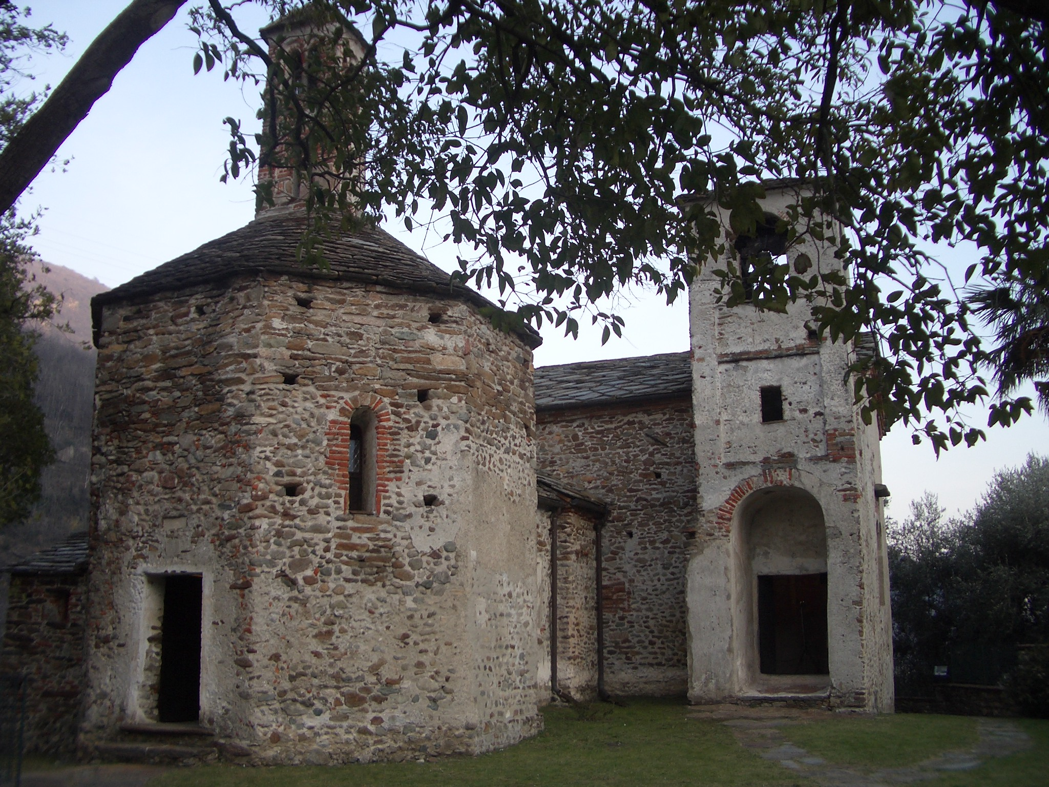 Pieve di San Lorenzo; Settimo Vittone, Turin, Italy